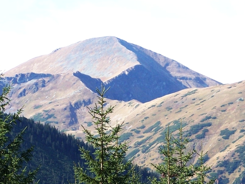 Grań Starorobociańskiego Wierchu. Widok znad Smreczyńskiego Stawu. Data:2006-05-09 Autor:Jerzy Opioła